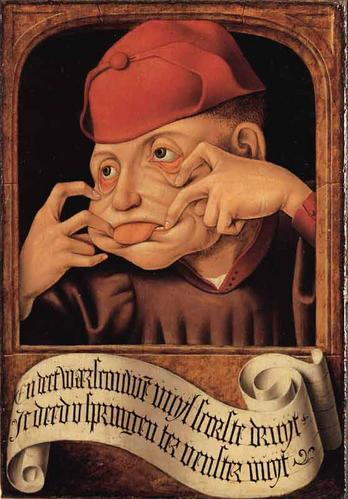 Homme grimaçant - Diptyque satirique flamand